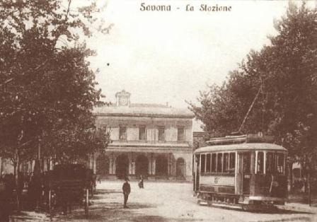 Savona - Tram in arrivo alla vecchia stazione ferroviaria (Letimbro).